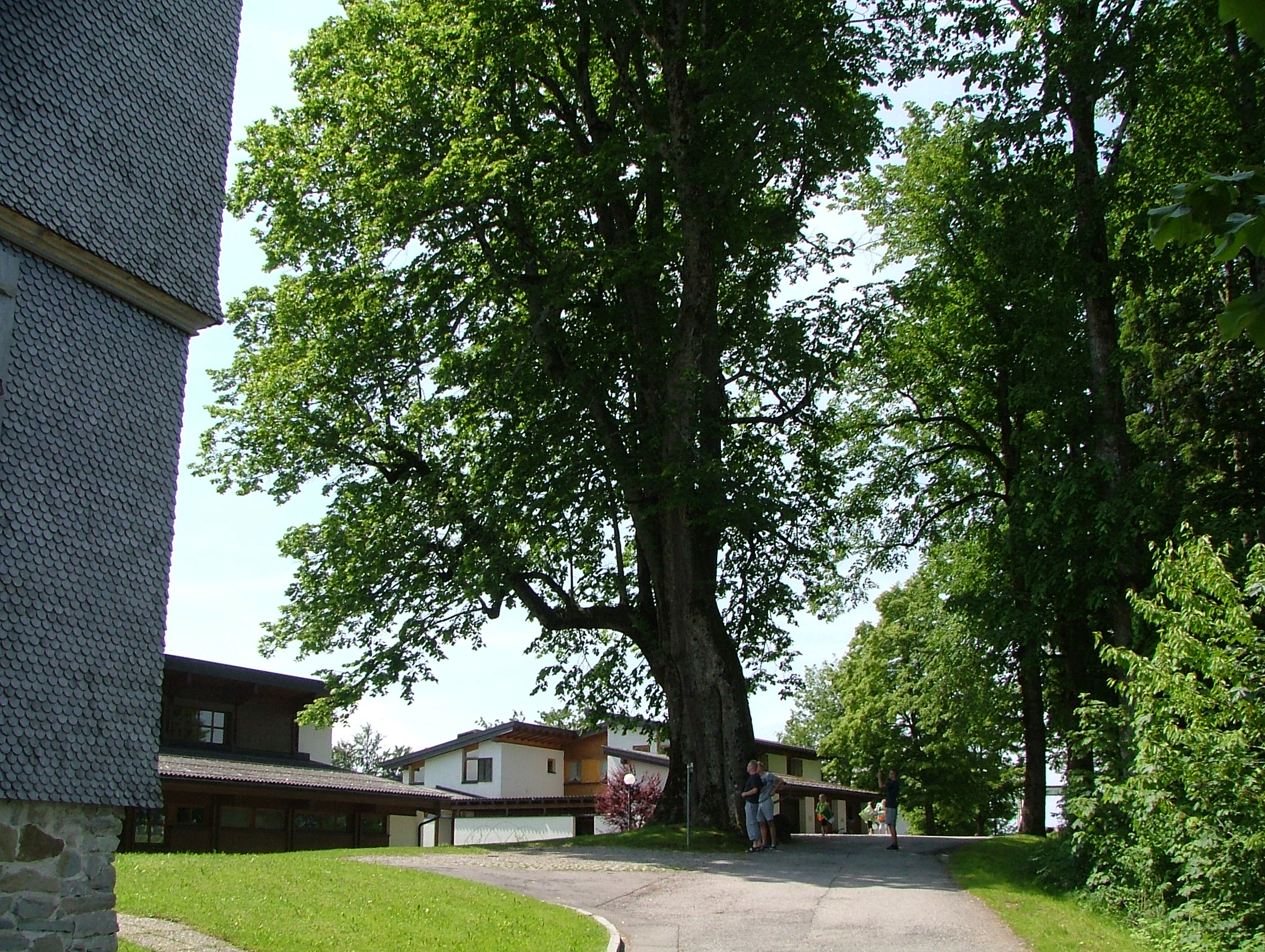 400 jährige Linde